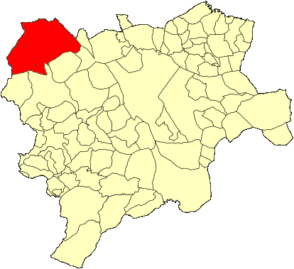 Mapa municipal de Albacete con el municipio de Villarrobledo resaltado en rojo.